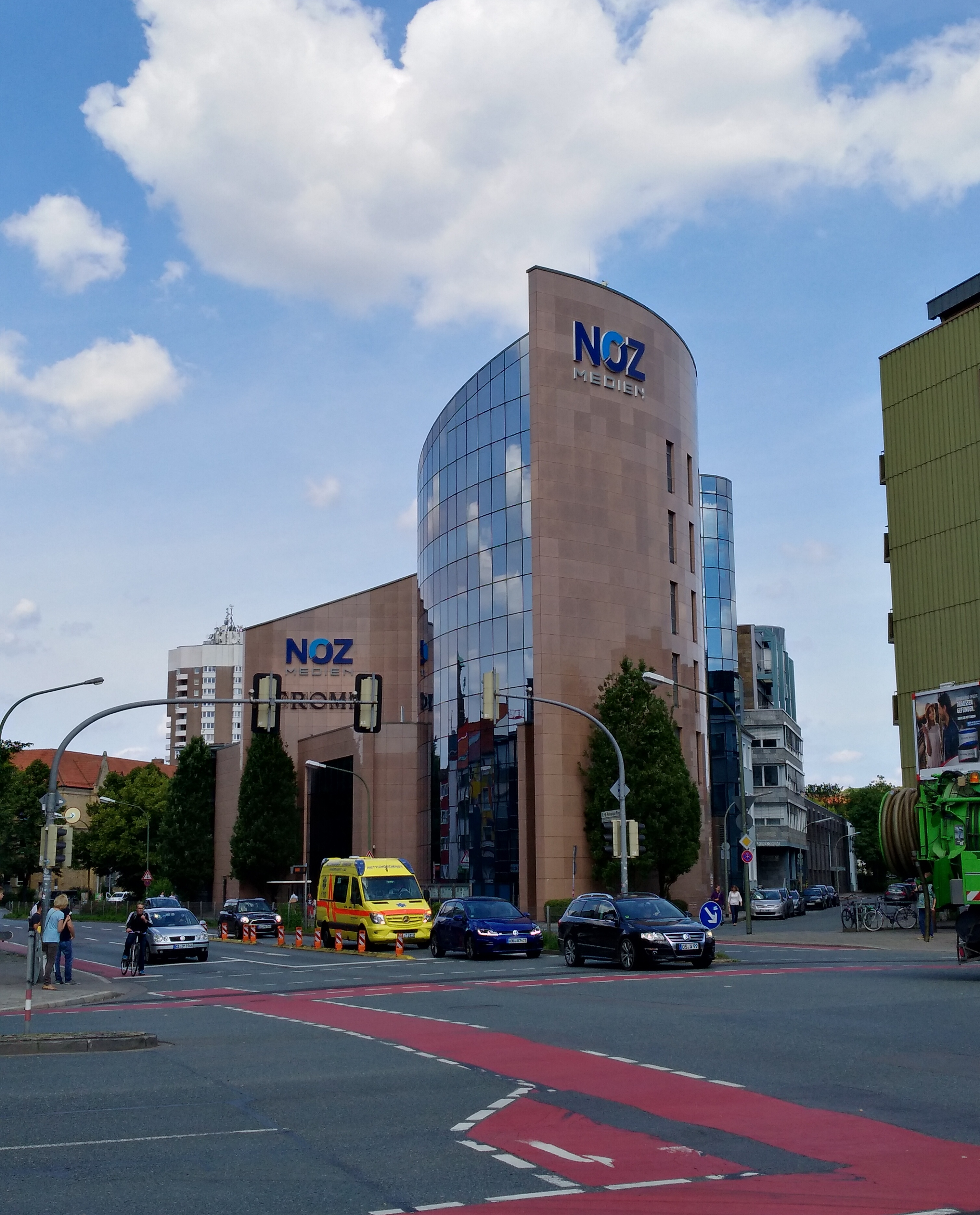 Das Gebäude der Verlagsgruppe "NOZ Medien" in Osnabrück.